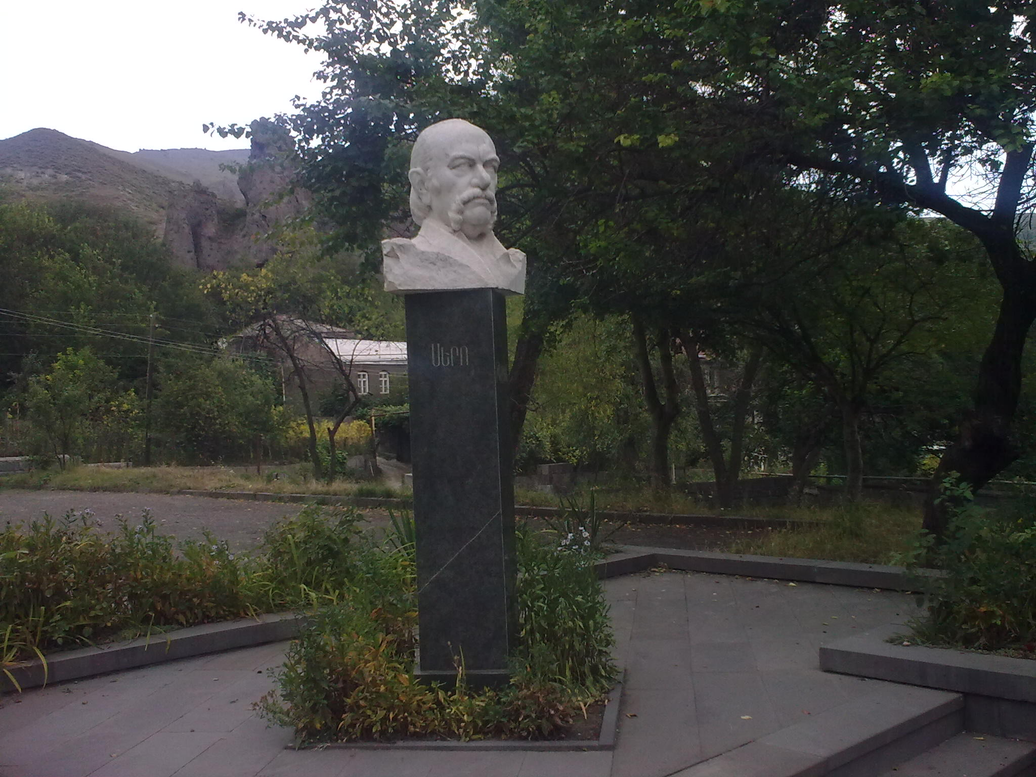 Սերո Խանզադյանի հուշարձան, Գորիս 3/134